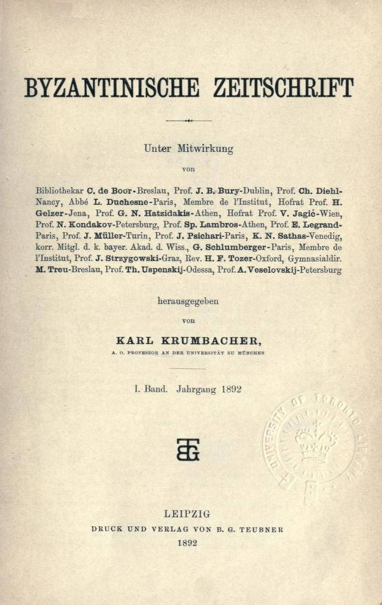 Titelseite der Zeitschrift / Title page of the periodical